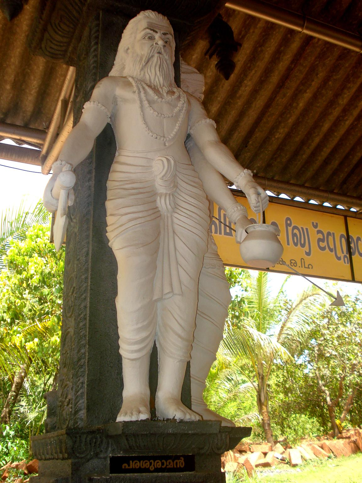 മഹാവിഷ്ണുവിന്റെ പത്ത് അവതാരങ്ങളിൽ ആറാമത്തെതാണ് പരശുരാമൻ. ചിത്രം എടുത്തത് കേരളത്തിൽ കണ്ണൂർ ജില്ലയിലെ കൂടാളി താറ്റിയോട്ട് അമ്പലത്തിൽ നിന്നാണ്.